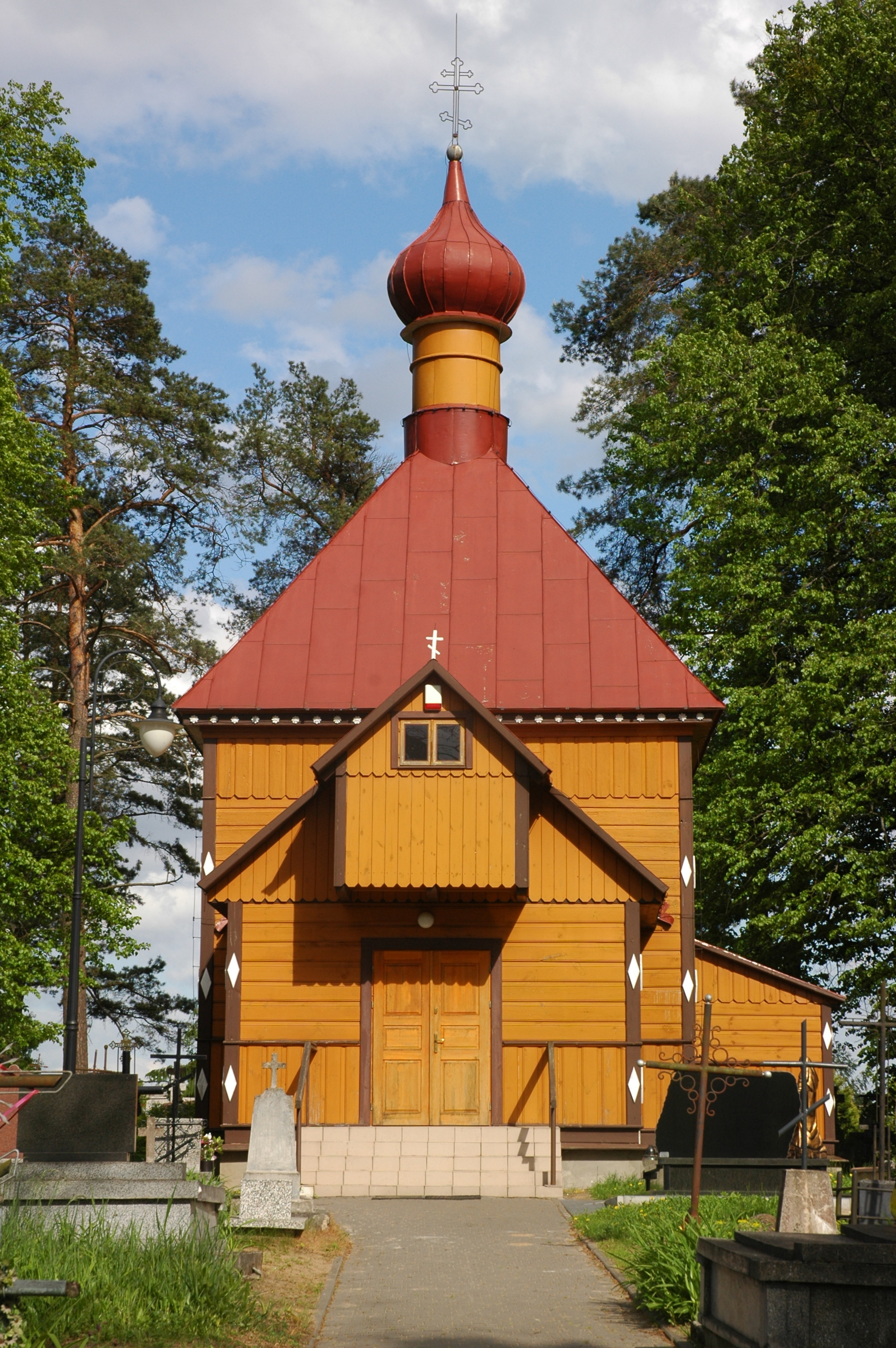 Cerkiew cmentarna Świętych Cyryla i Metodego w BiałowieżyLietuvių: Bialoviežos Šv. Kirilo ir Metodijaus cerkvė